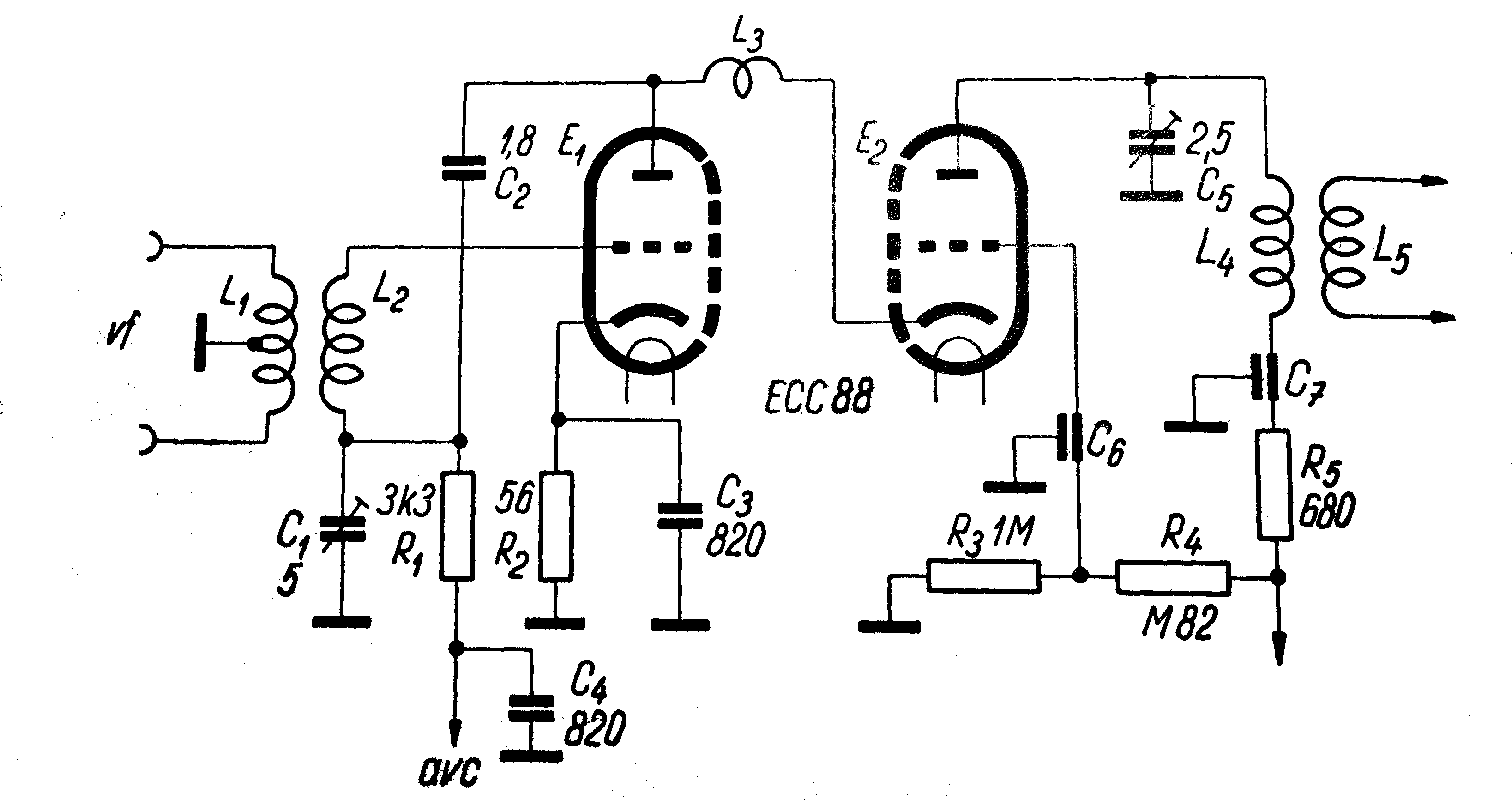 TV channel selector cascode amplifier